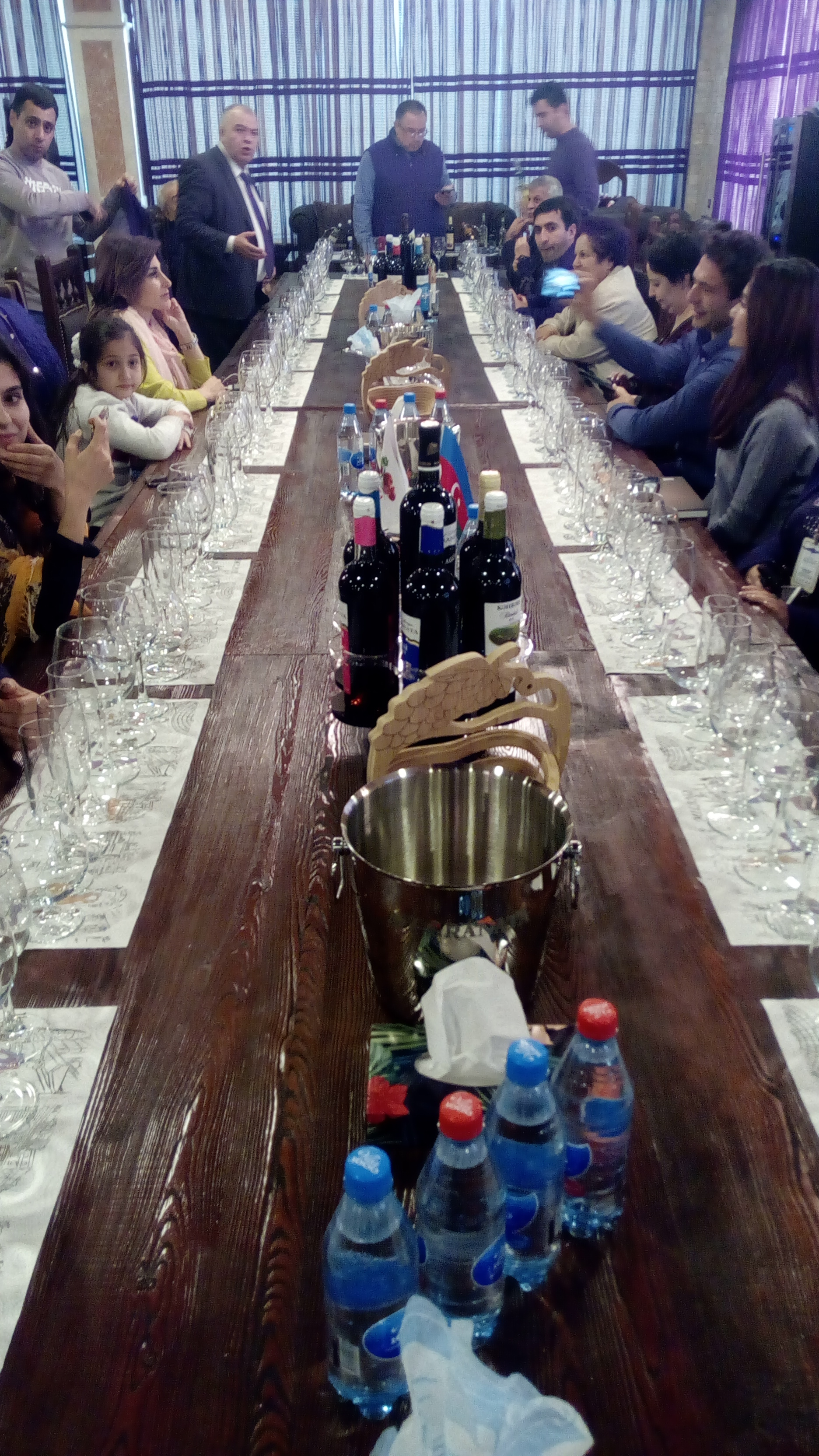 MİRAS-la Az-Granataya səfər